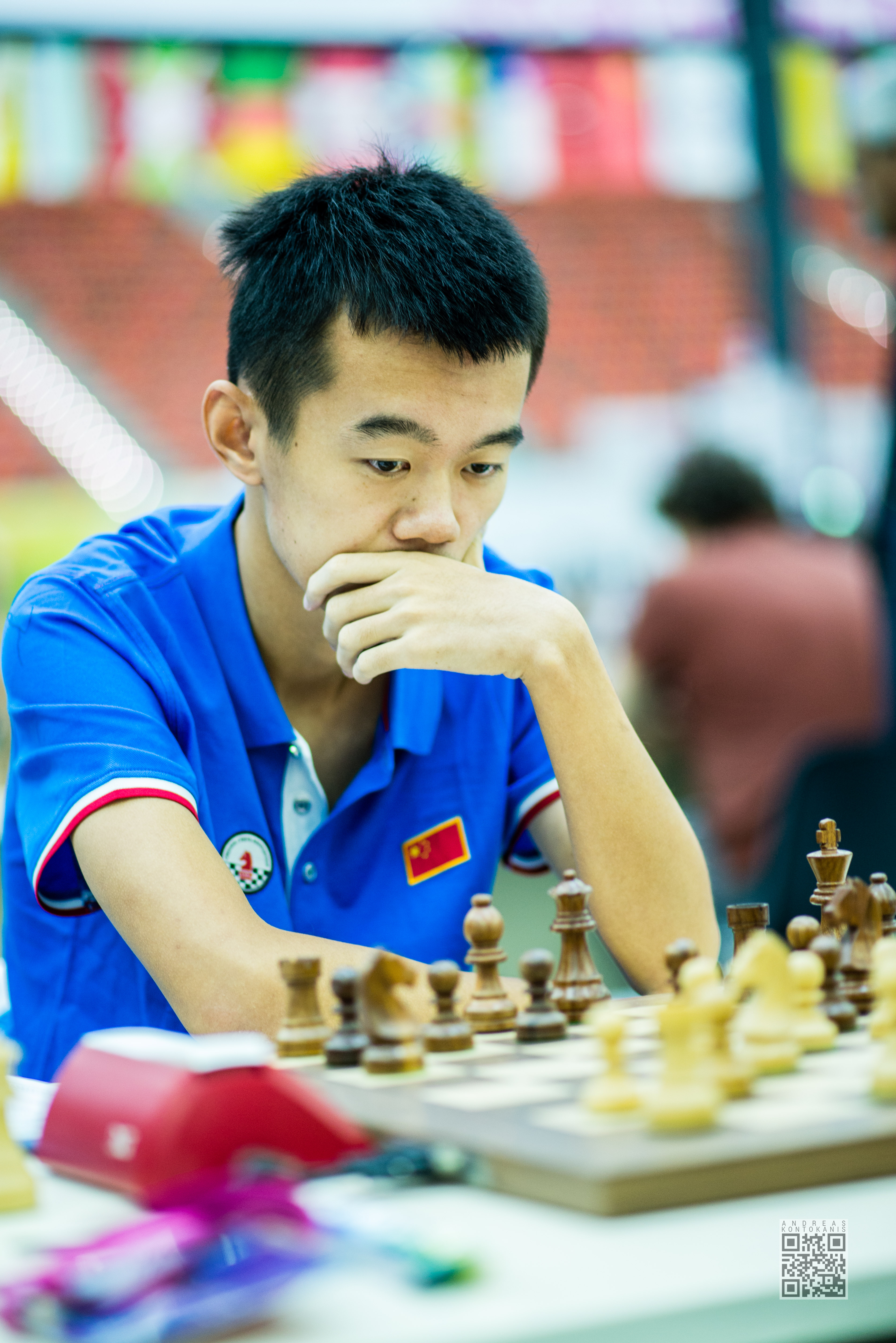 Ding Liren